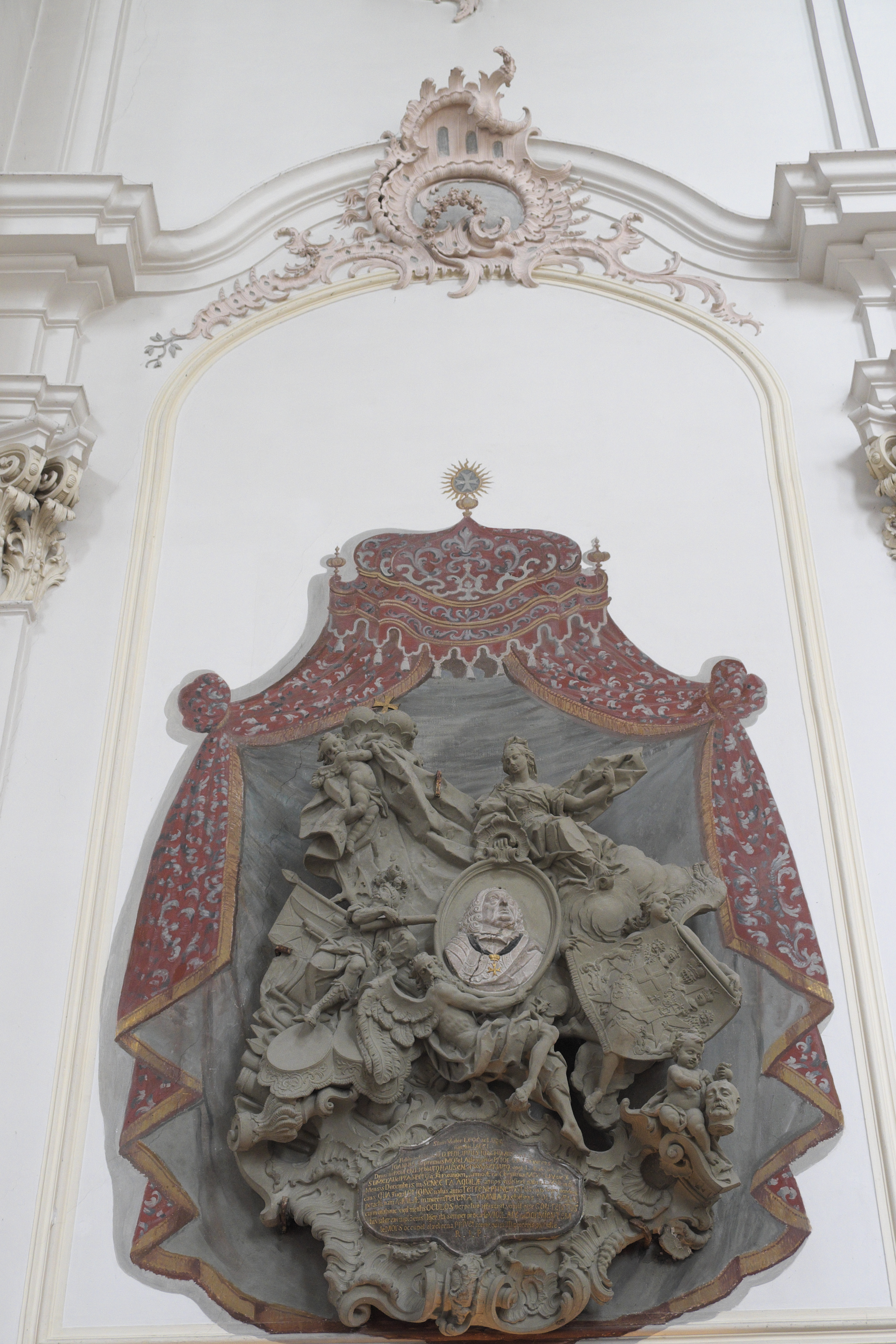 Franziskanerkirche in Überlingen im Bodenseekreis (Baden-Württemberg/Deutschland), Epitaph